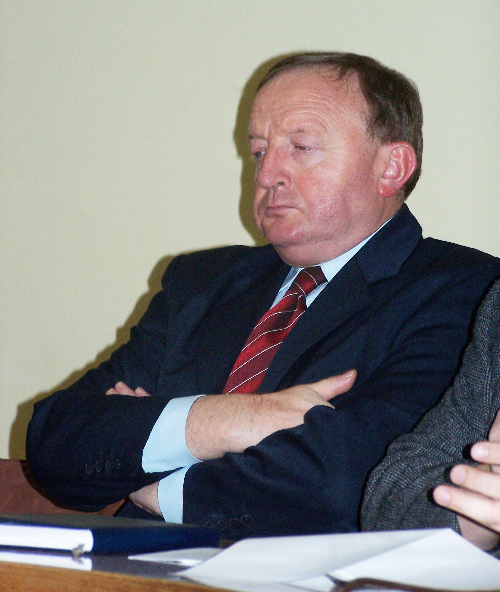 Stanisław Michalkiewicz, Warszawa.